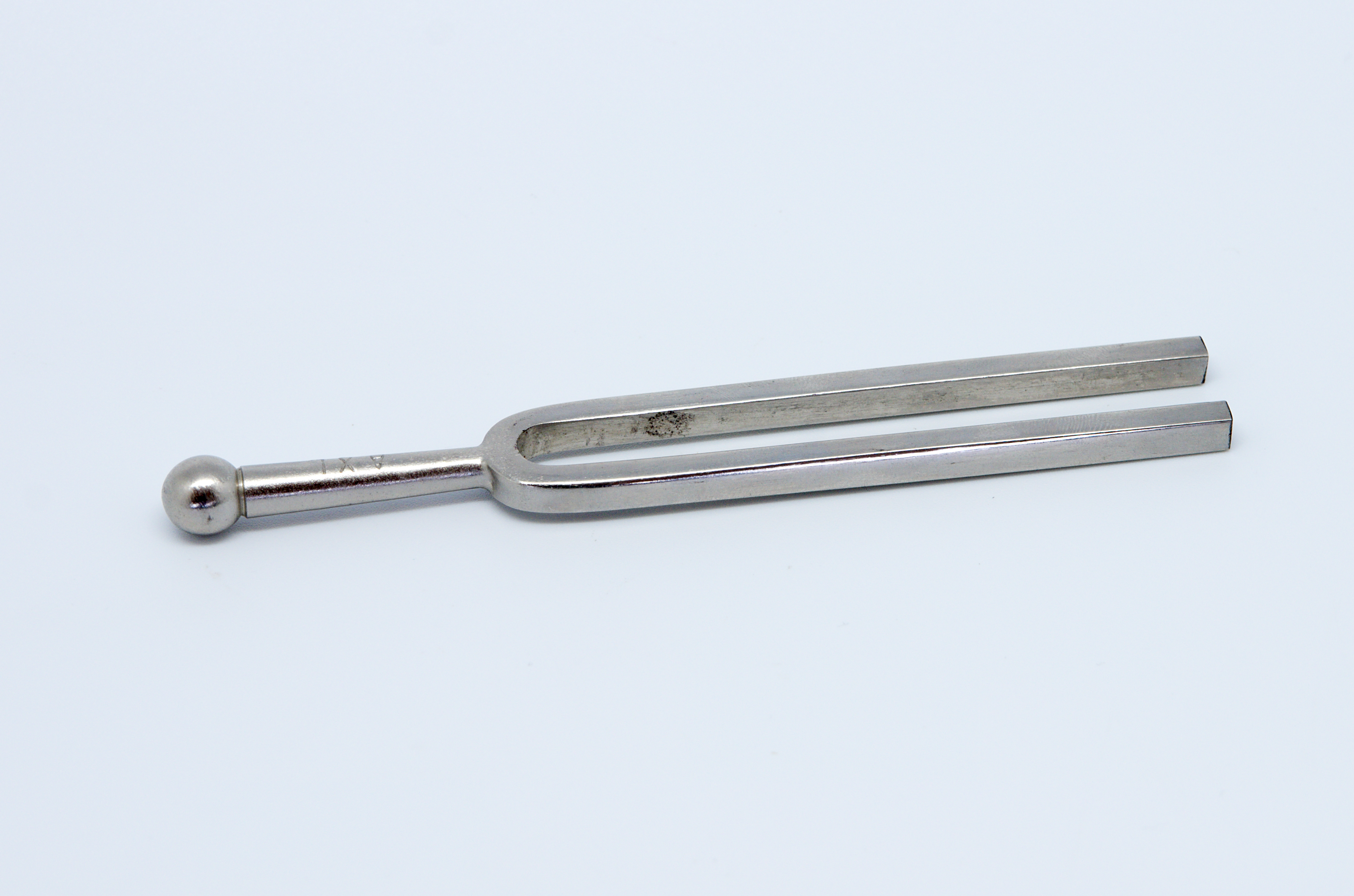 Diapason